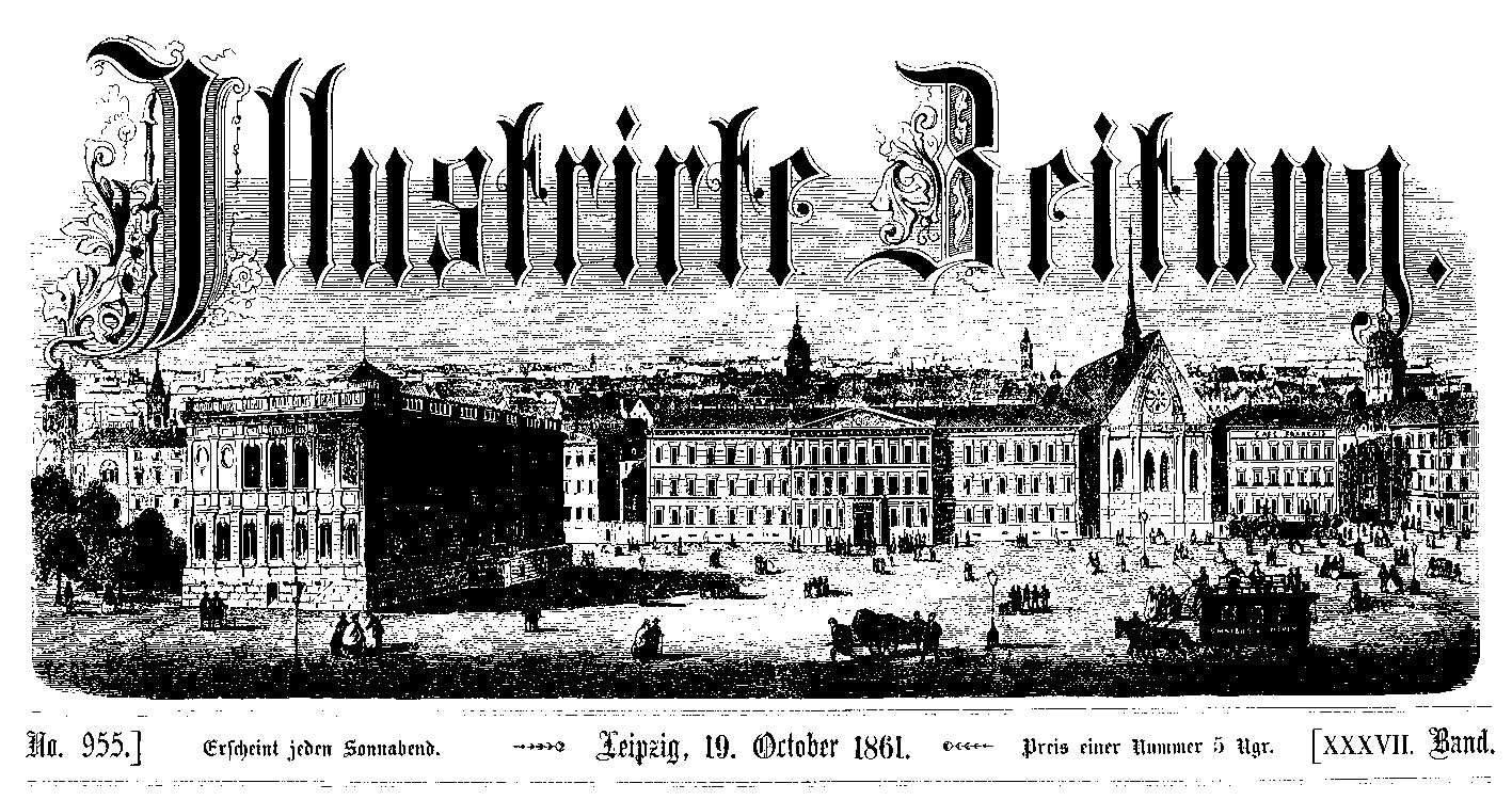 Cover "Illustrirte Zeitung", 1861